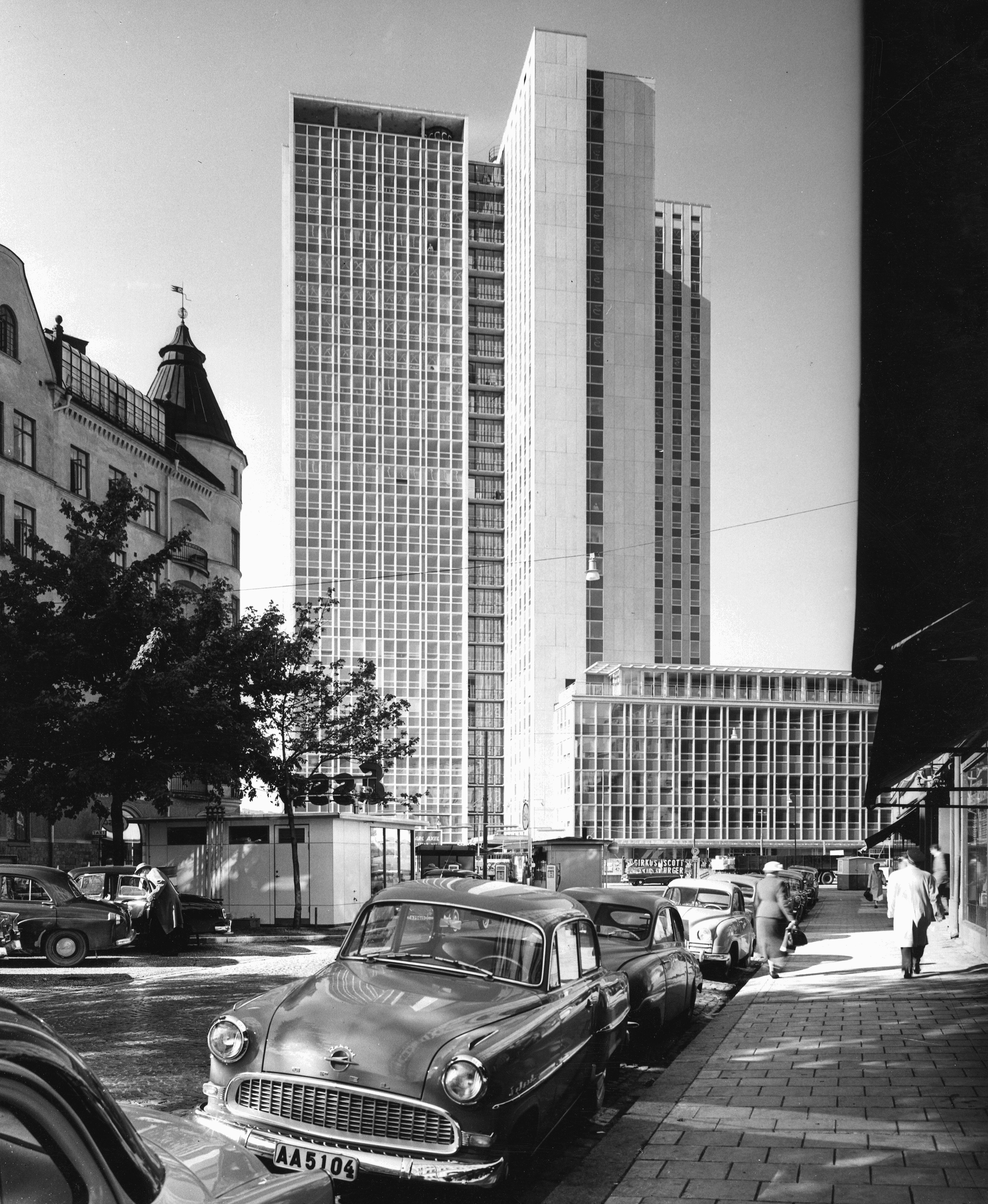 Skattehöghuset i kvarteret Gamen, vy från Bondegatan, arkitekt Paul Hedqvist